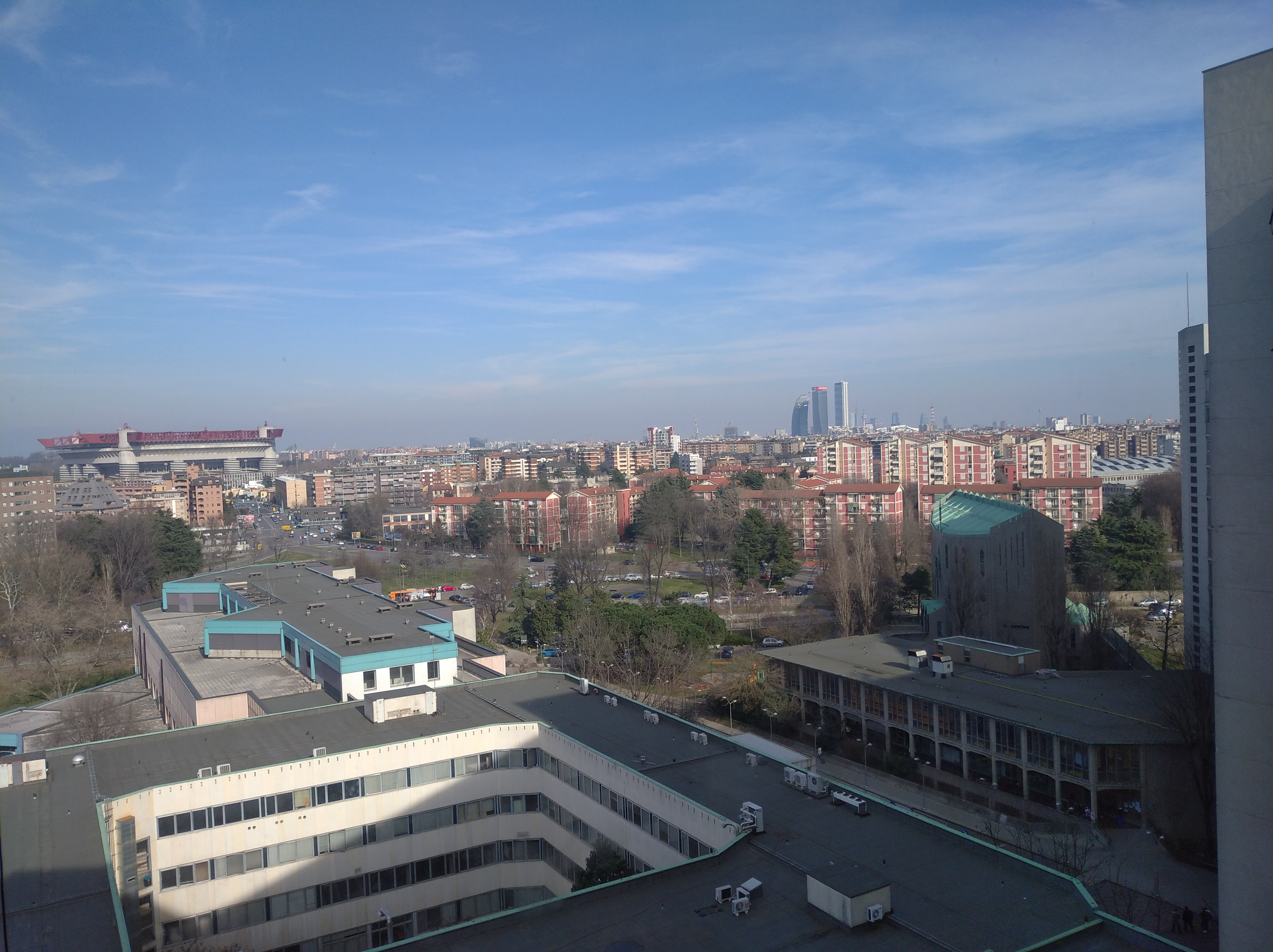 La Chiesa di Giò Ponti vista dall'Ospedale San Carlo Borromeo